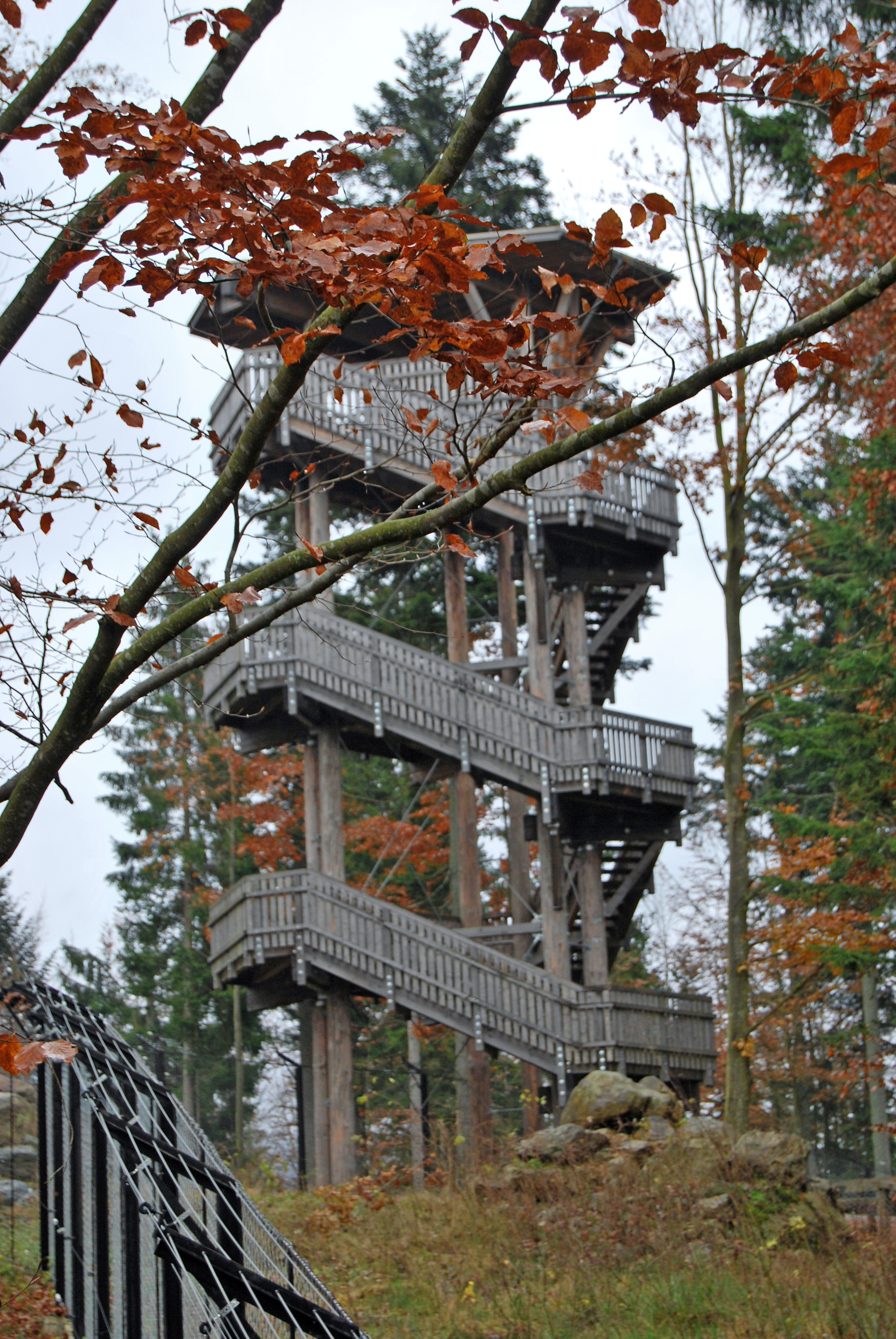 Aussichtsturm im Nationalpark Bayerischer Wald (Ludwigsthal)